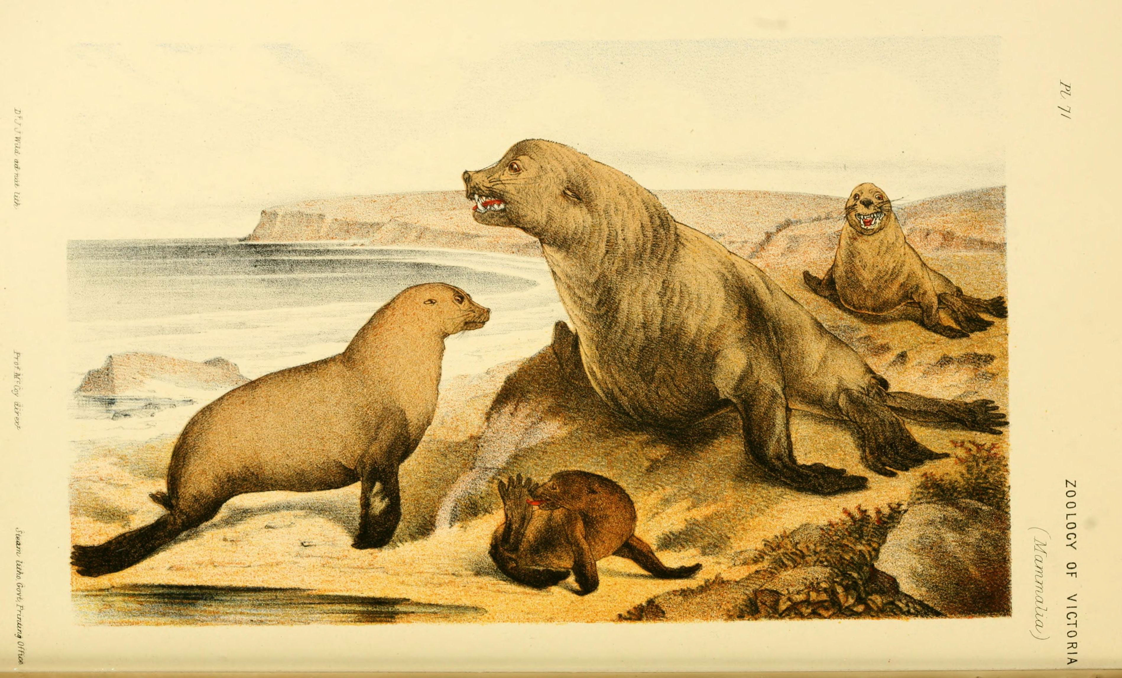 Euotaria cinerea (=Arctocephalus pusillus doriferus)